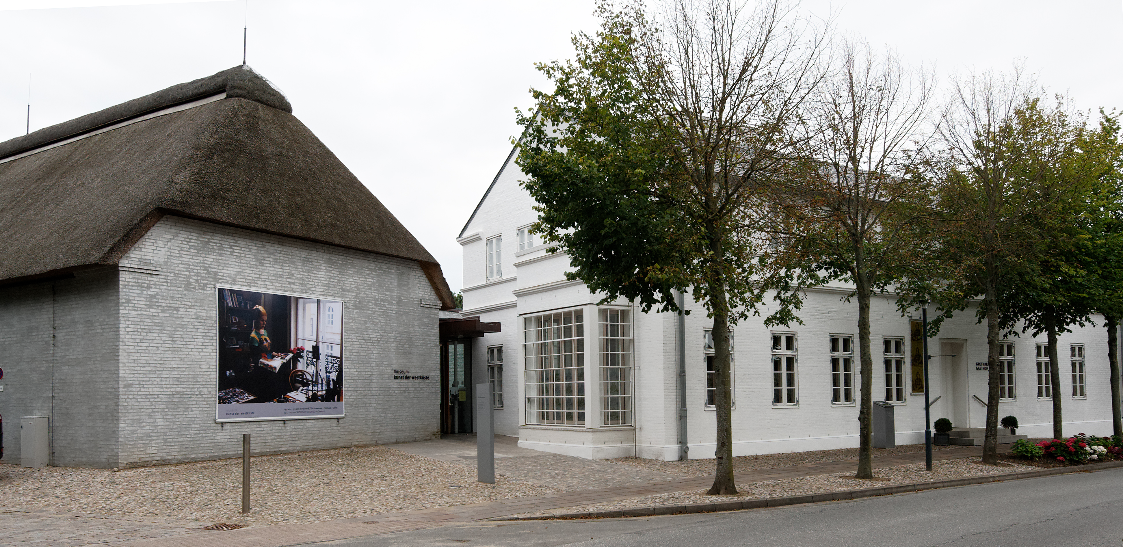 Museum Kunst der Westküste in Alkersum auf der Insel Föhr.